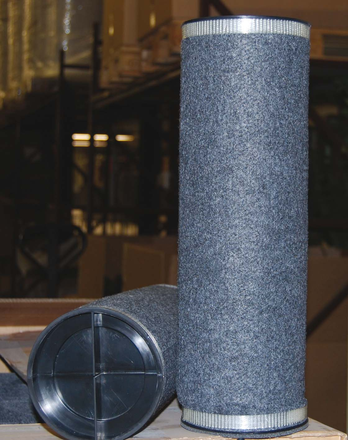 kolfilterpatron